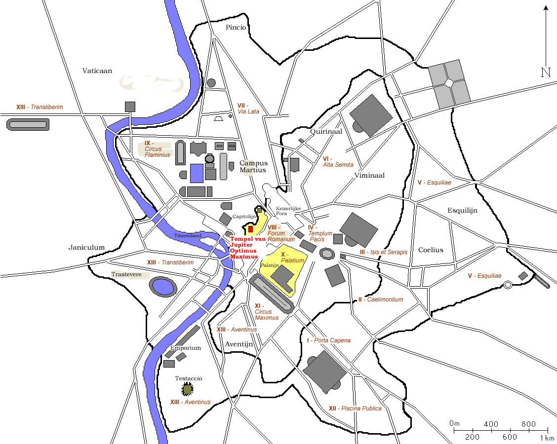 Kaart van antiek Rome waarop de Tempel van Jupiter Optimus Maximus is uitgelicht. Kaart is afkomstig van FR:wiki en door mij naar een Nederlandse versie bewerkt. Auteurs: nl::fr:User:ColdEel en Gebruiker:Joris1919